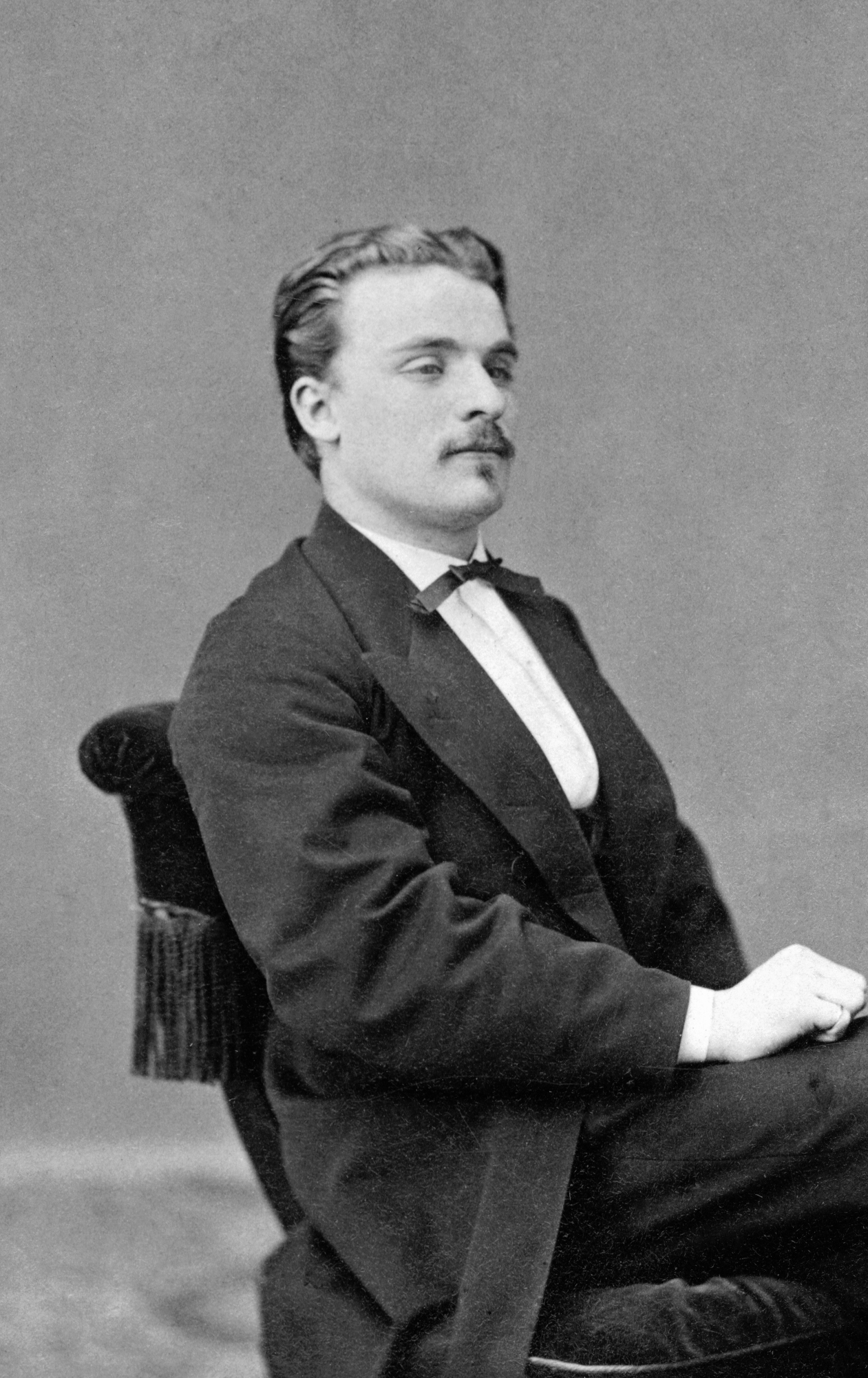 Ferdinand (Ferdinando) Ambrosi, italiensk operasångare vid Kungliga Operan 1868